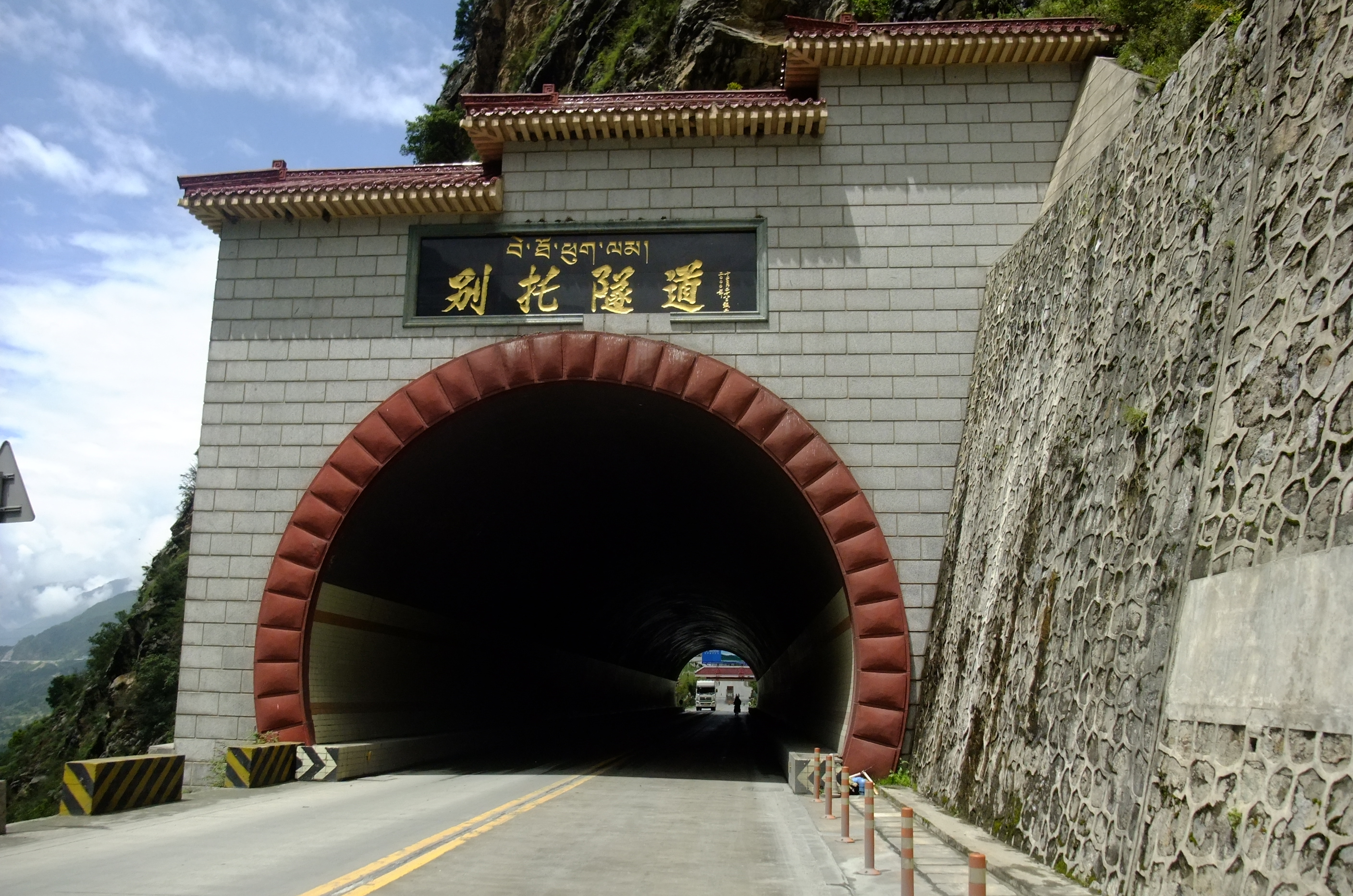 318国道别托隧道